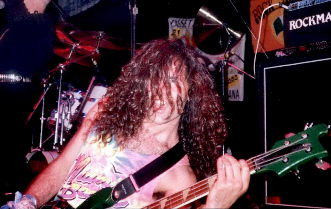 Foto de Santi Rubio en un concierto en Los Angeles California.